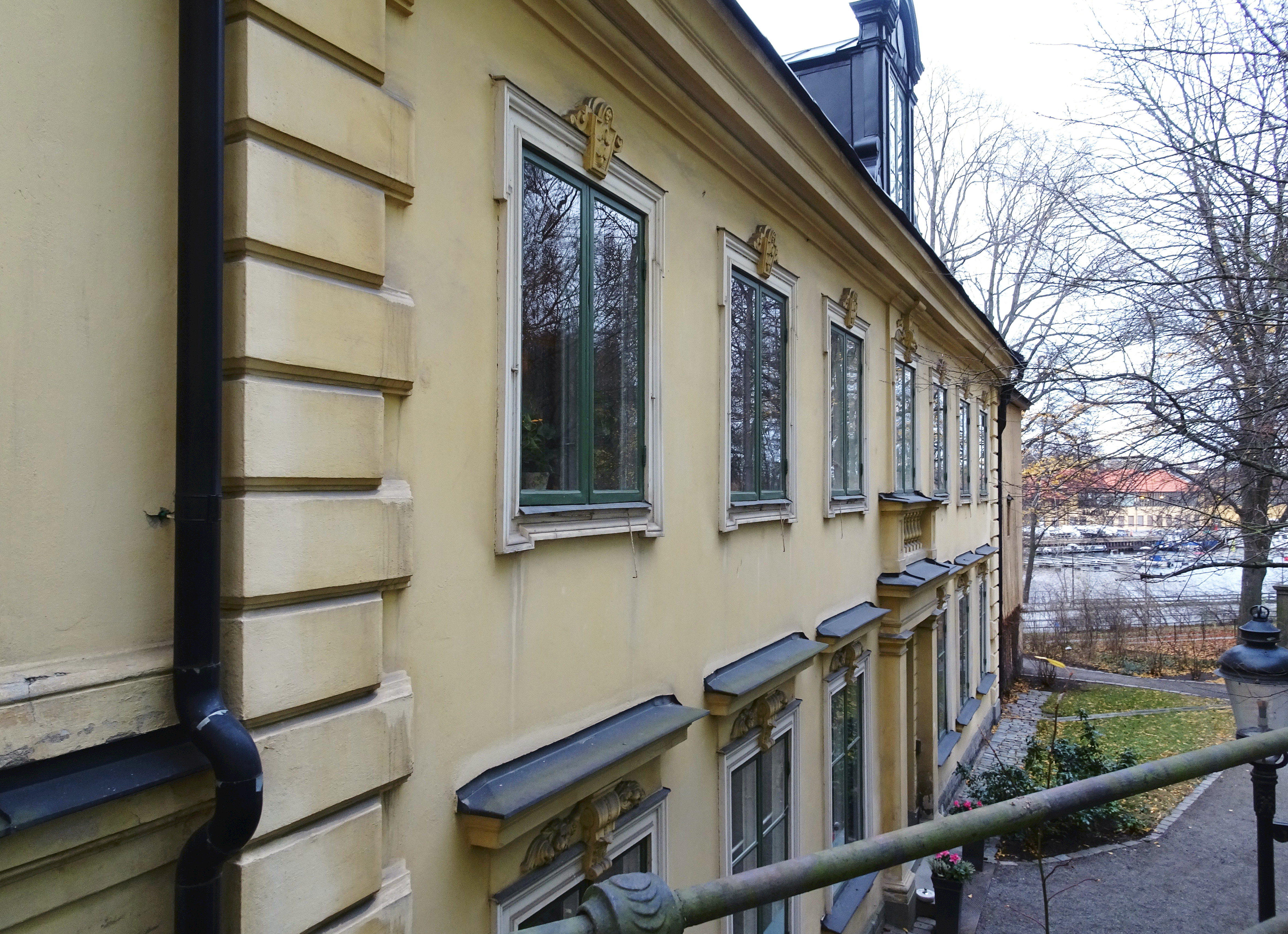 Heleneborgs malmgård på Södermalm, Stockholm (fasad mot söder)